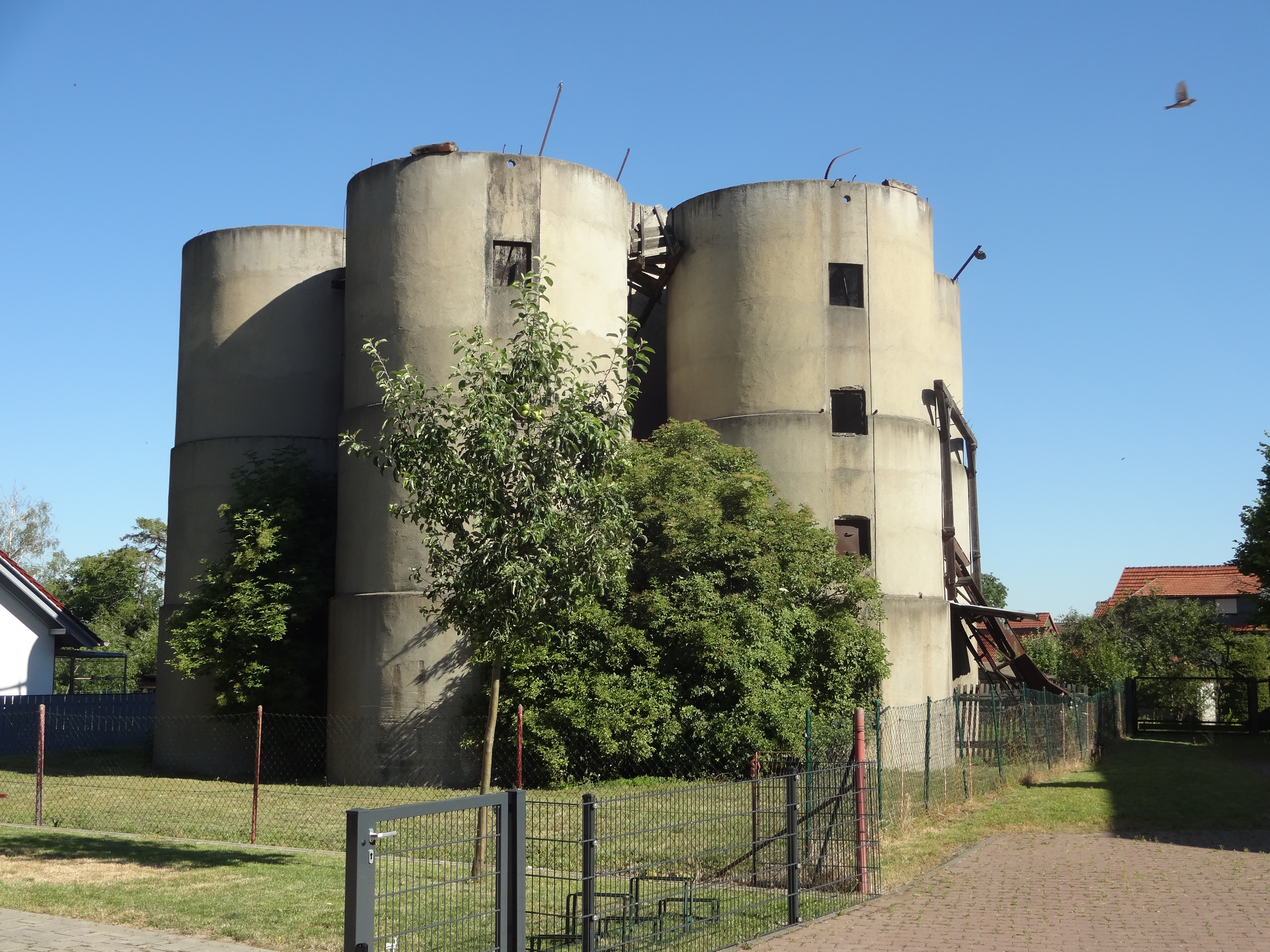 denkmalgeschütztes Silo am Amtshof in Langeln Gemeinde Nordharz